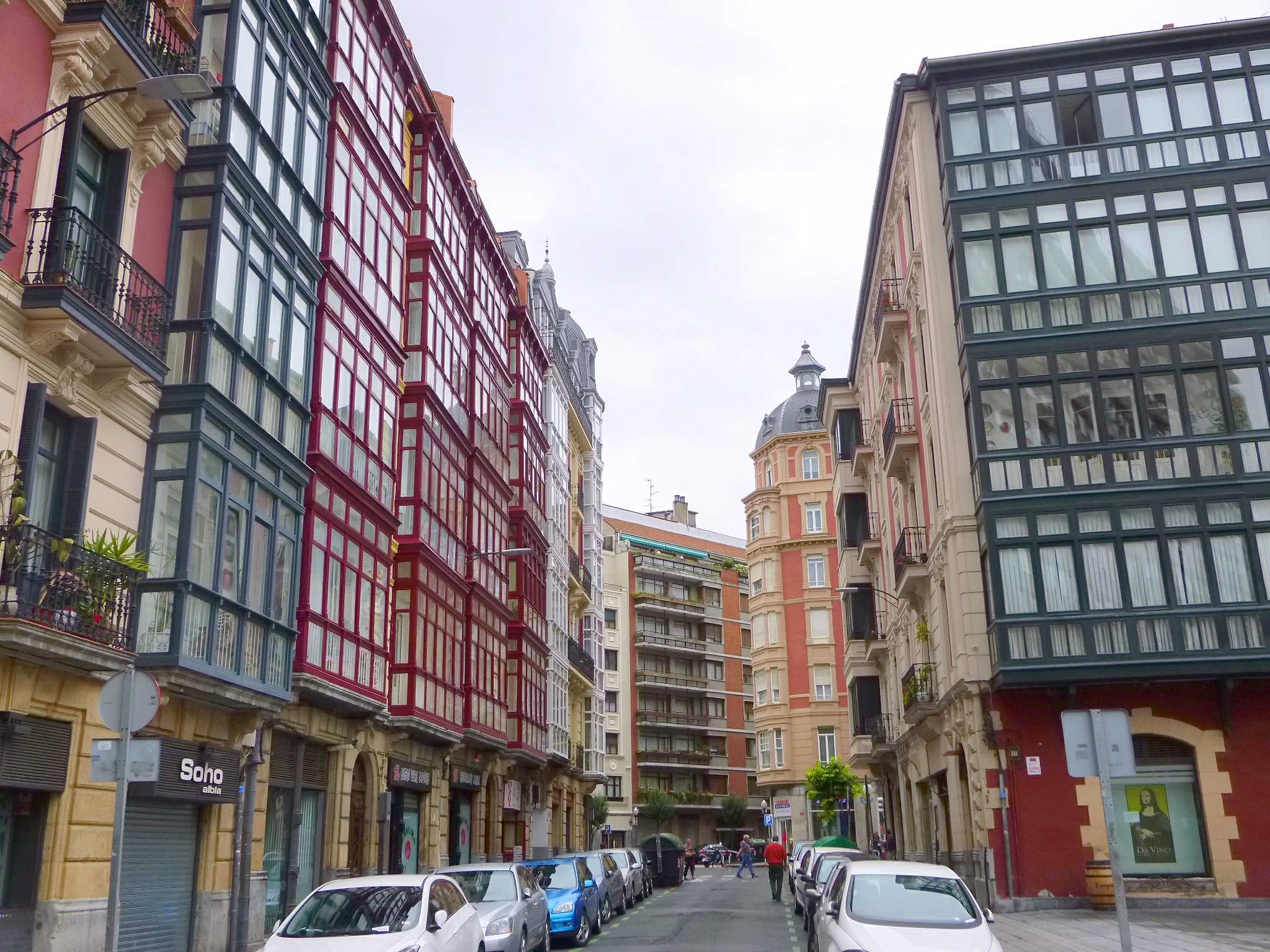 Calle Arbolancha (Bilbao)